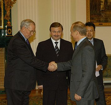 Николай Азаровукраинский политический и государственный деятель. На фото слева направо: первый вице-премьер Украины Николай Азаров, заместитель премьер-министра Белоруссии Андрей Кобяков, президент России Владимир Путин, заместитель премьер-министра Казахстана Сауат Мынбаев